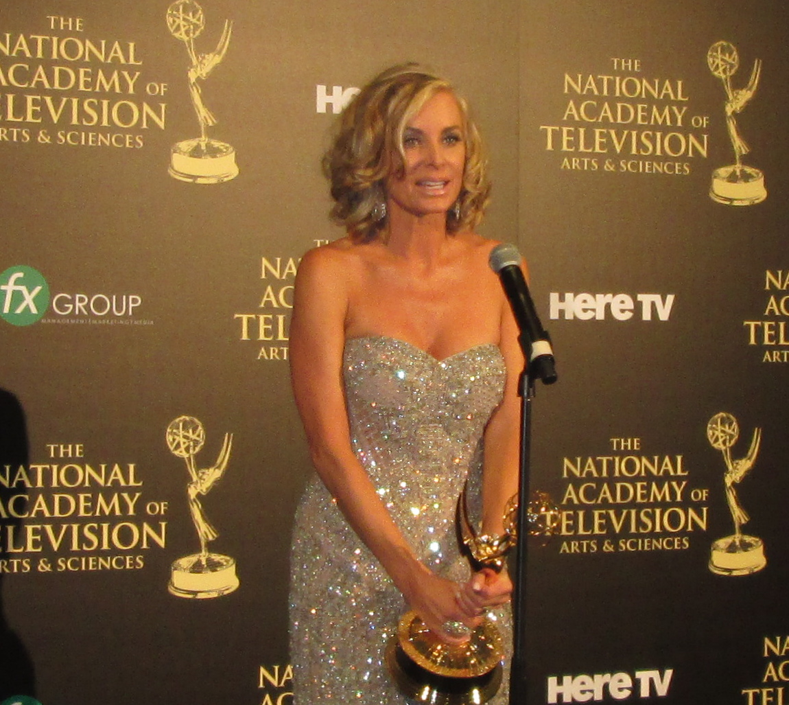 Eileen Davidson